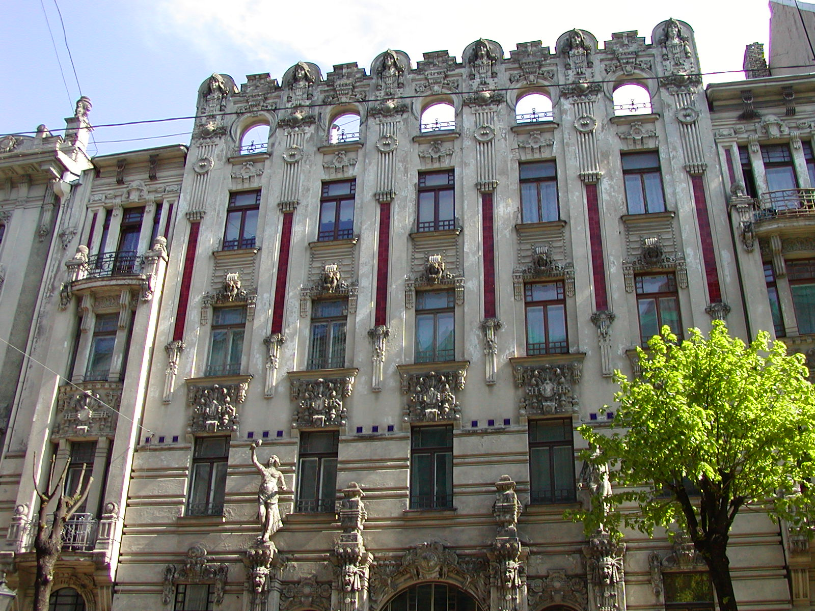 Building at Strelnieku iela 2a, architect Mikhail Eisenstein